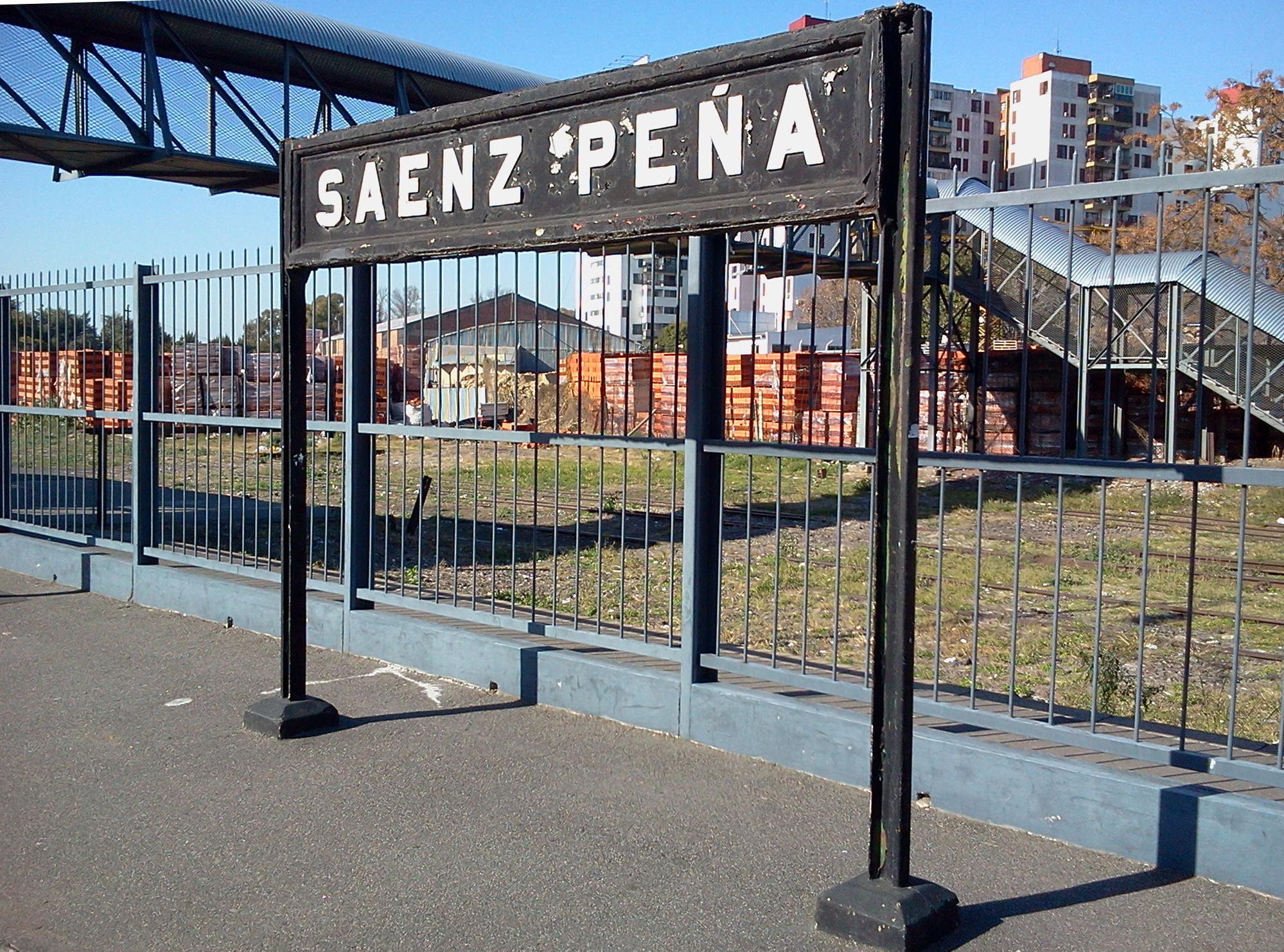 Cartel Nomenclador